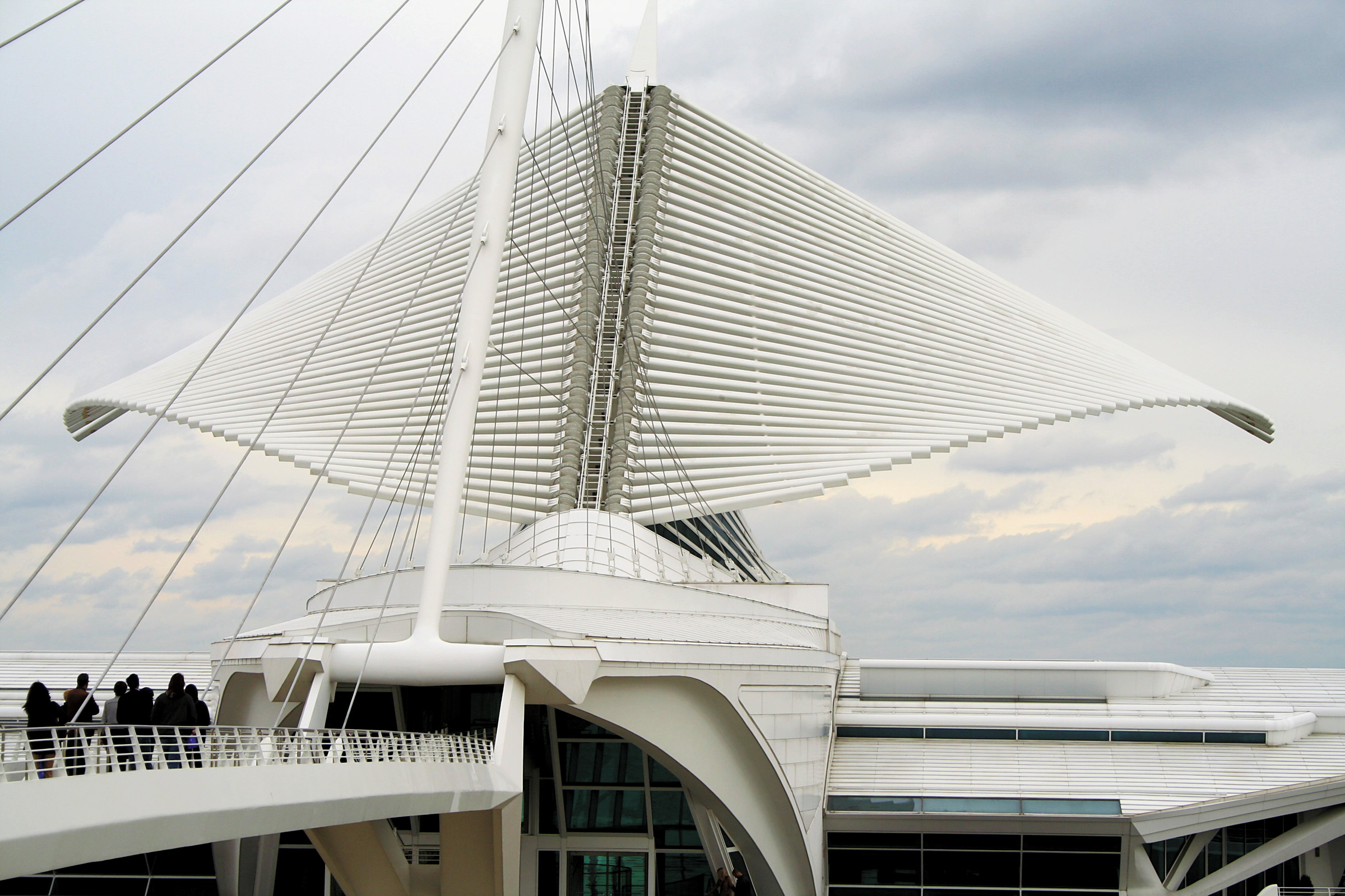 Milwaukee Art Museum, version 2img_2344